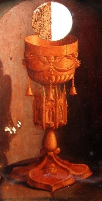 Porta de sacrário. Retábulo da capela da Madre de Deus Óleo sobre madeira. Oficina de Diogo de Contreiras (c. 1500; 1565), 1552 (c.) Fotografia de 1998. Capela da Madre de Deus, Caniço.